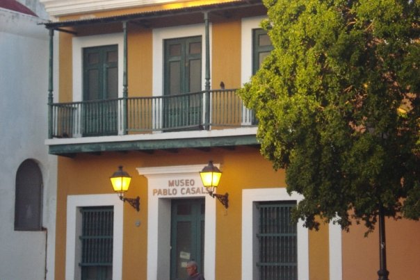 Pablo Casals Muzej, San Juan Puerto Rico